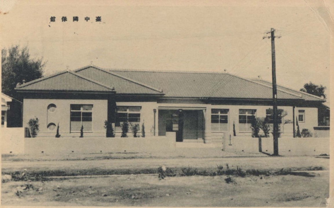 臺中鄰保館，已拆除，現為衛生福利部中區兒童之家